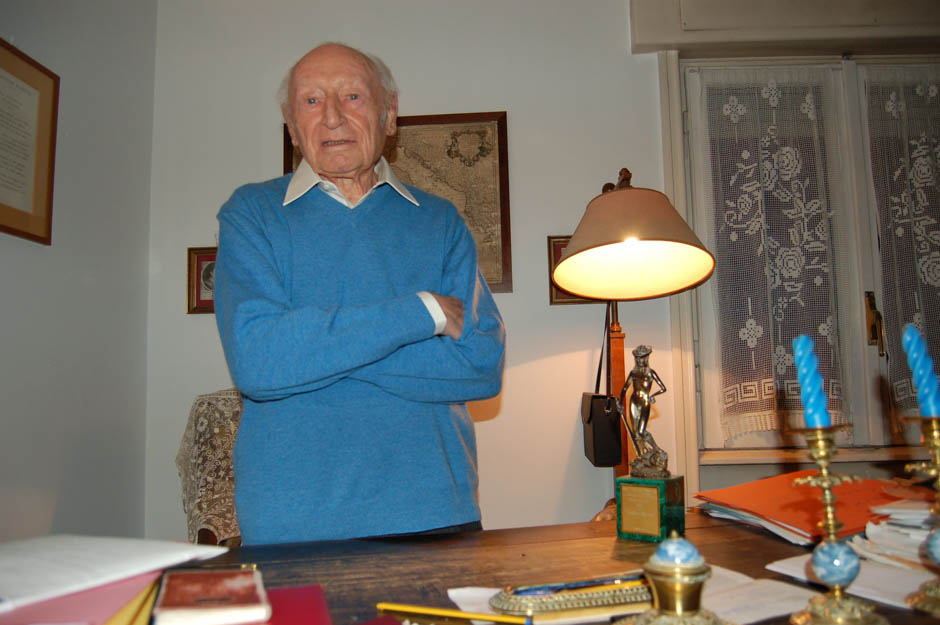 l'autore nel suo studio. Roma 2007